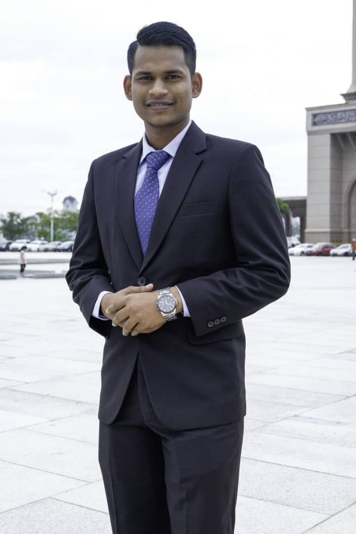 Muhamad Nantha Khalish Bin Rajendran